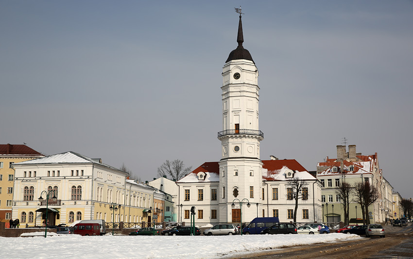 Магілёў. Ратуша